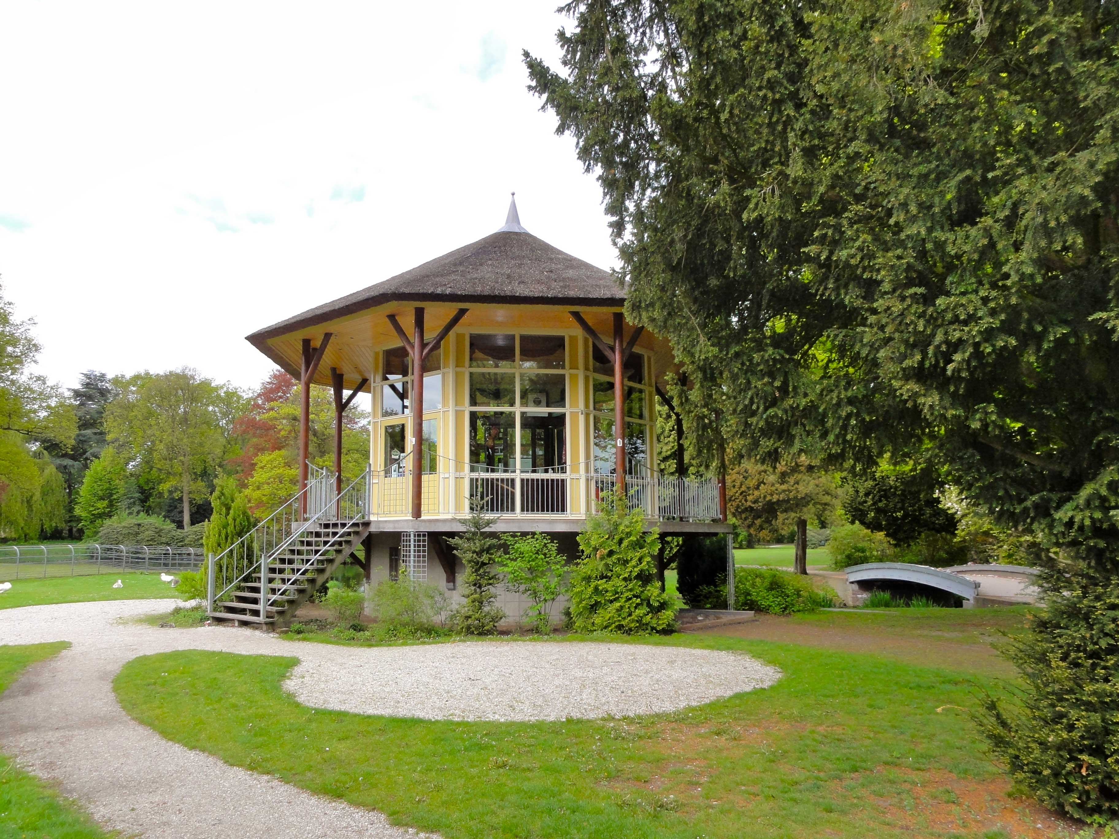 Park Rams Woerthe (rijksmonument)